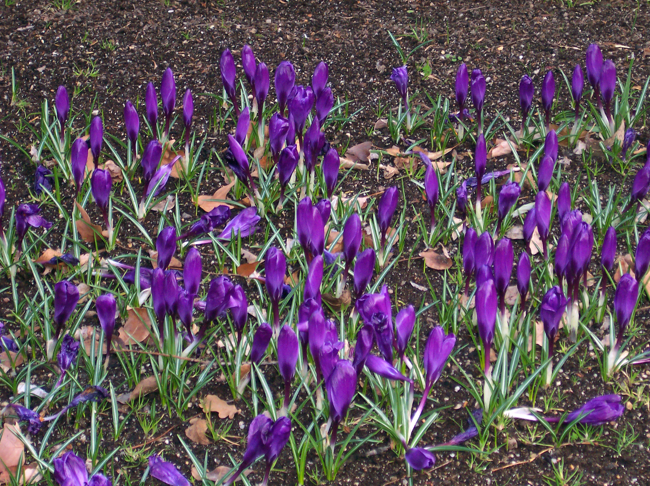 Crocus vernus 'Purpureus Grandiflorus'. Real Jardín Botánico, Madrid